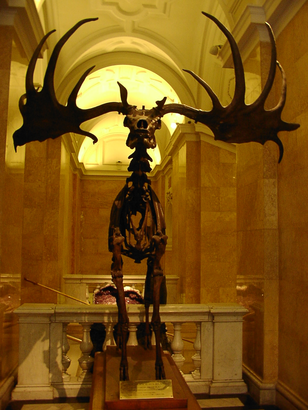 Skelett eines Megaloceros giganteus im Naturhistorischen Museum Wien